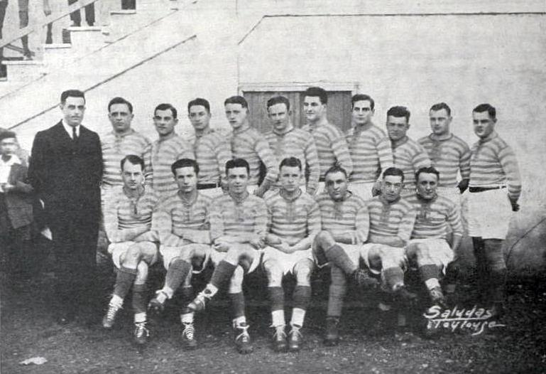 Le T.O.E.C. Champion du Sud-Ouest et des Pyrénées, en 1934 (rugby à XV, équipe excellence).